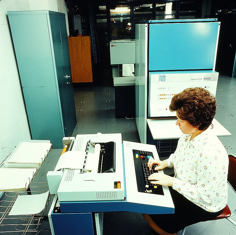 Original image description from the Deutsche FotothekFacharbeiter für Datenverarbeitung